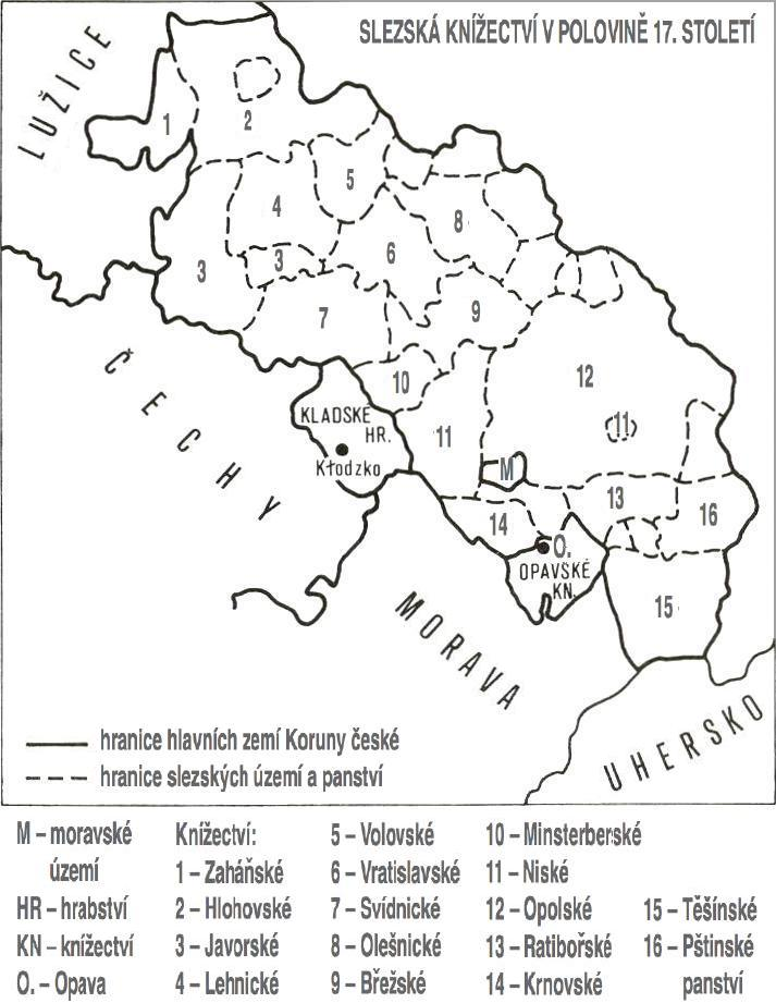 Mapa Slezských knížectví a panství v polovině 17. století.